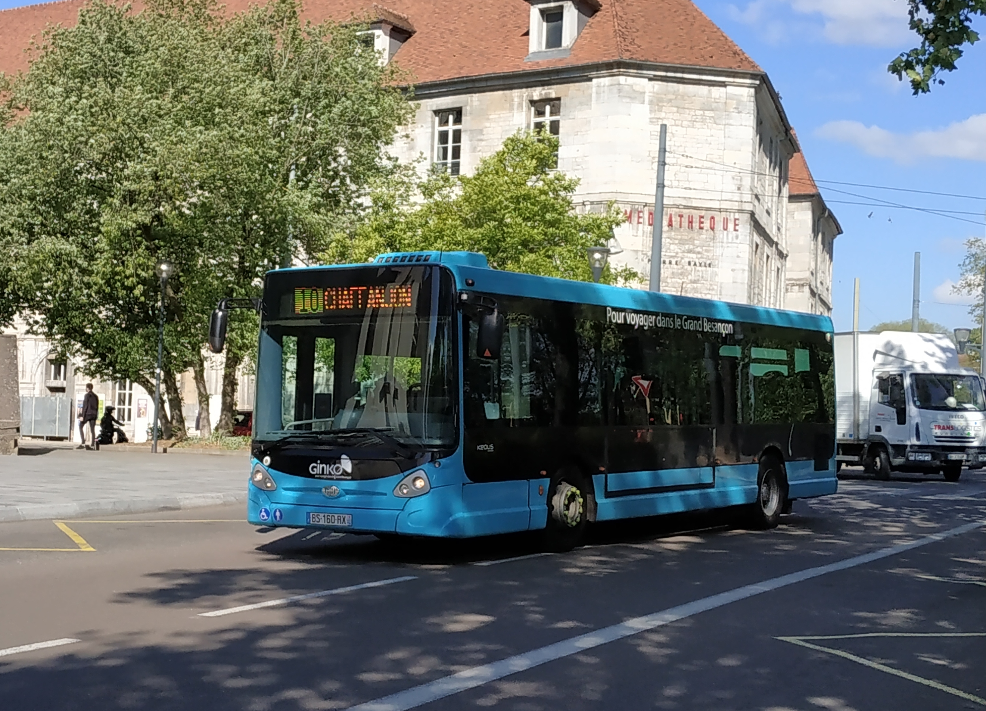 Heuliez GX 137 Ginko, ligne 10